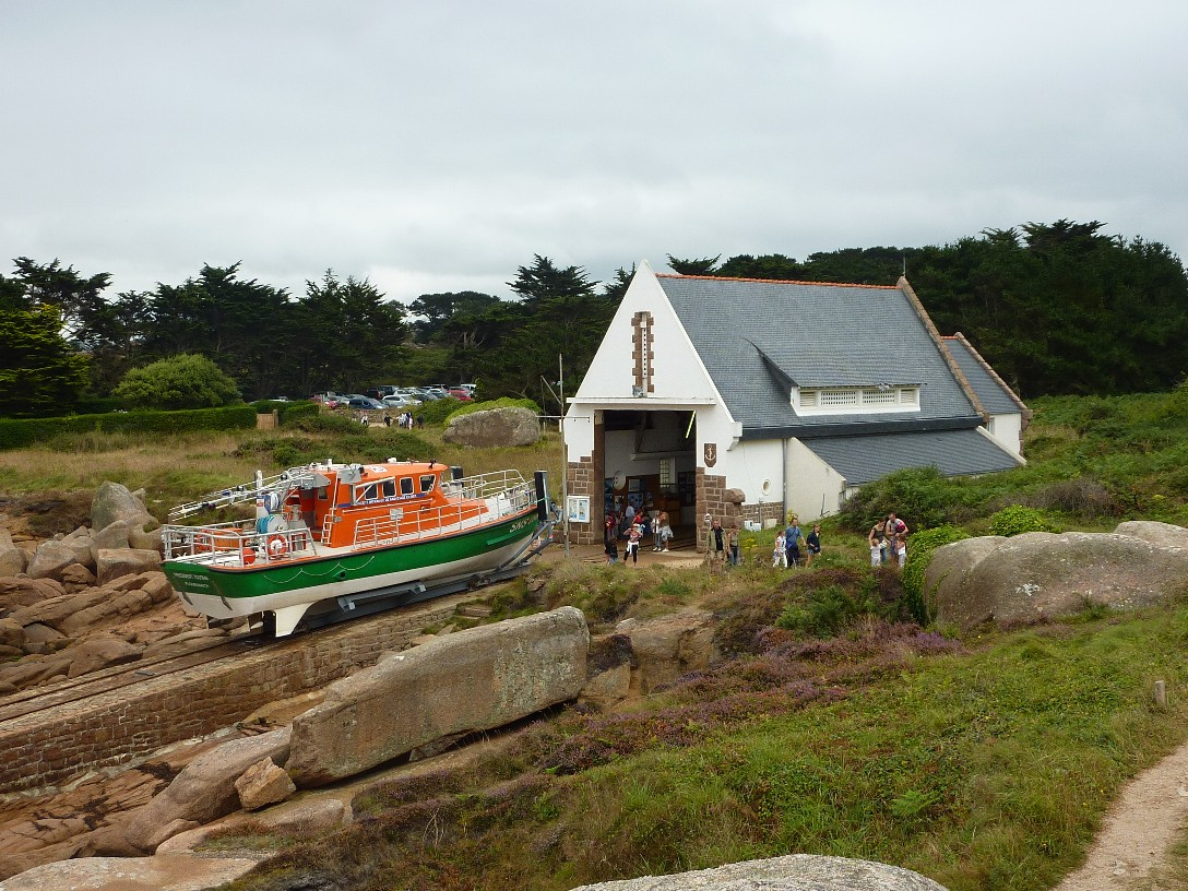 Le canot "tous temps" Président Toutain (SNS 098) sur sa rampe de lancement à Ploumanac'h le 22/08/2010